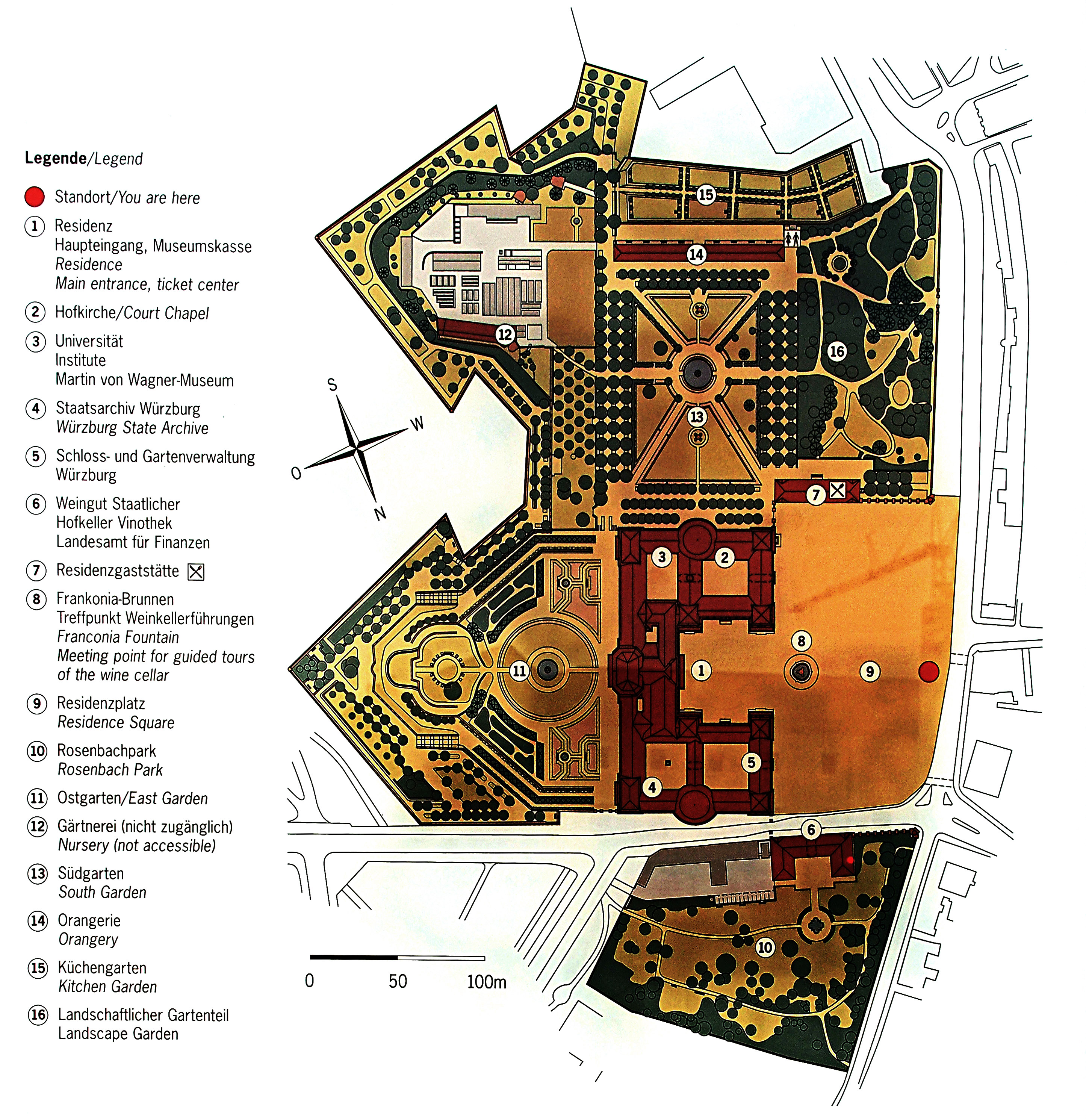 Öffentlicher Plan der Residenz mit Hofgarten